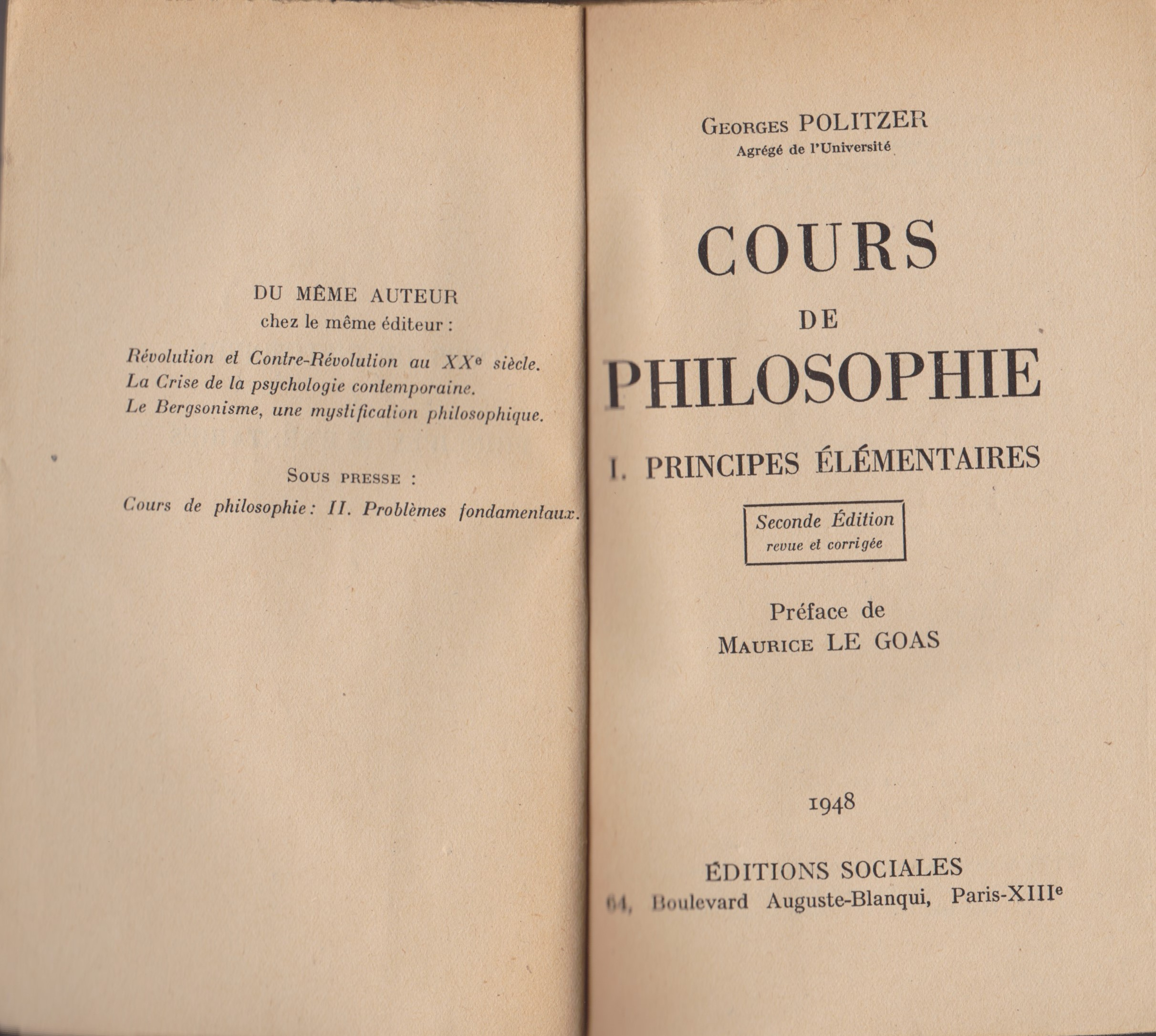 Page de titre du livre de Georges Politzer : "principes élémentaires de philosophie", ouvrage tiré de son cours de philosophie à l'Université ouvrière avant la Seconde guerre mondiale. Ce livre est édité par les éditions sociales, alors pilotées par le Parti communiste français .